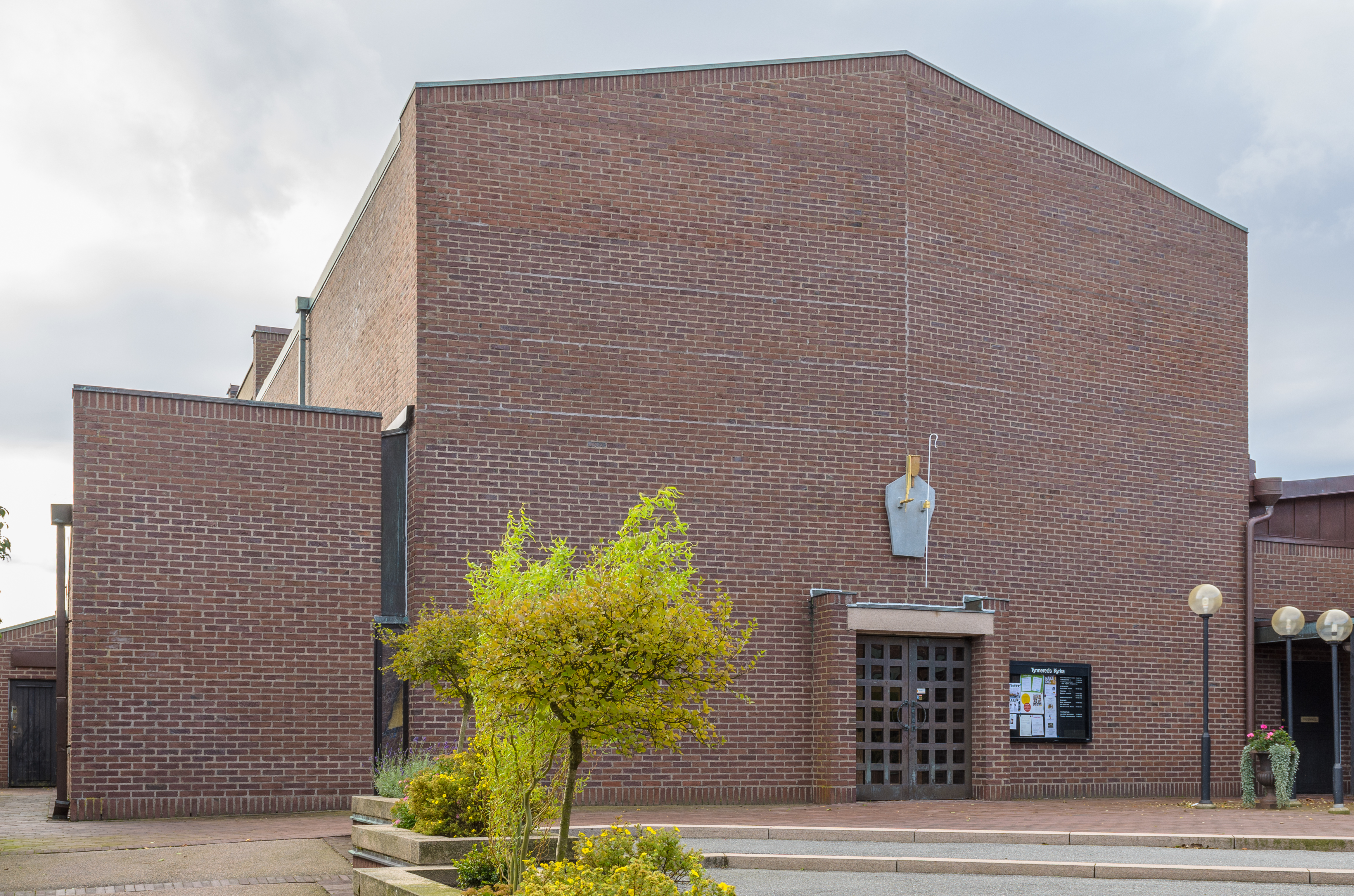 Tynnereds kyrka (church), Gothenburg, Sweden.